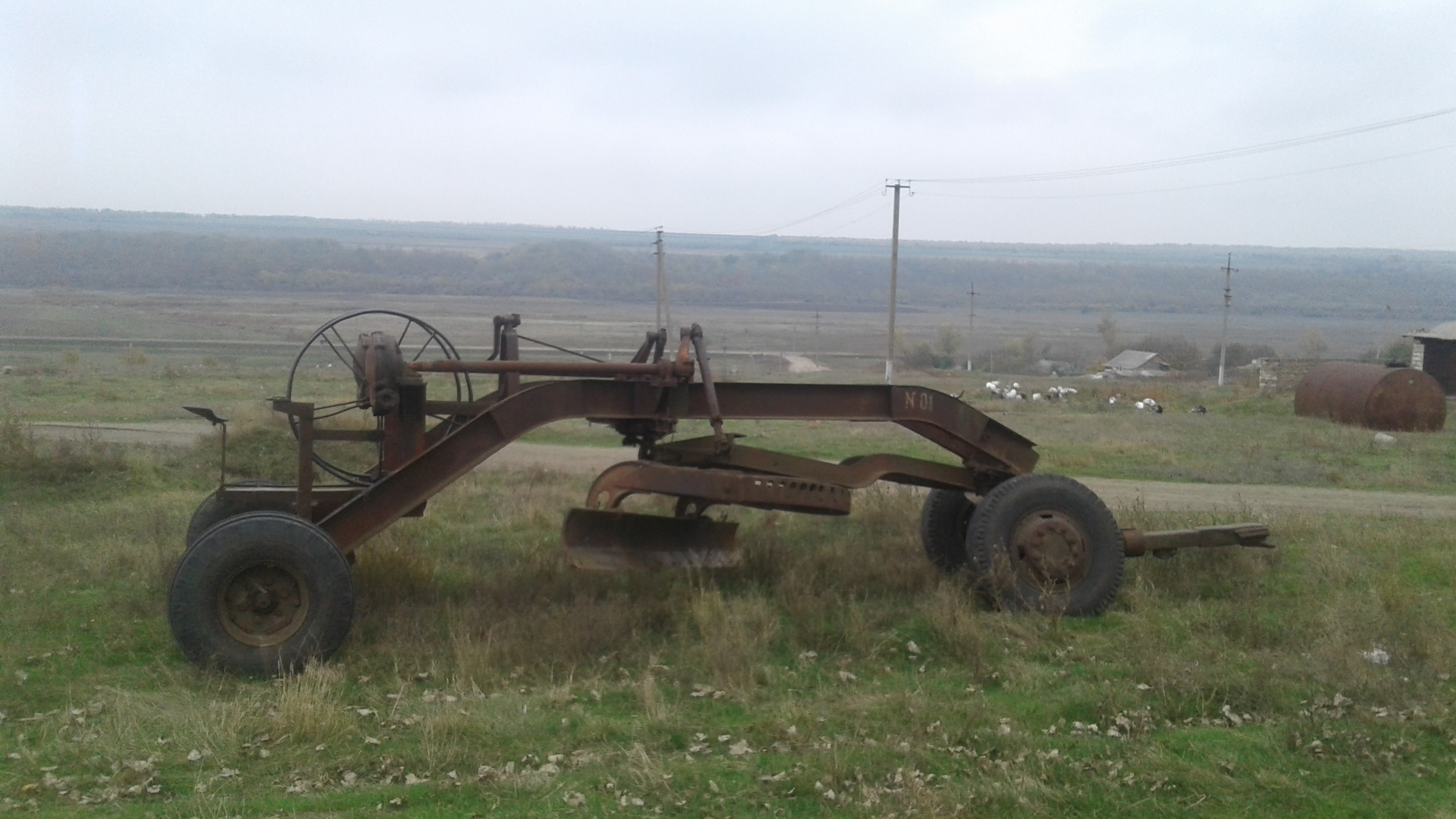 Прицепной грейдер Д-20Б (Завод-изготовитель: Коростенский дорожных машин "Октябрьская кузница")